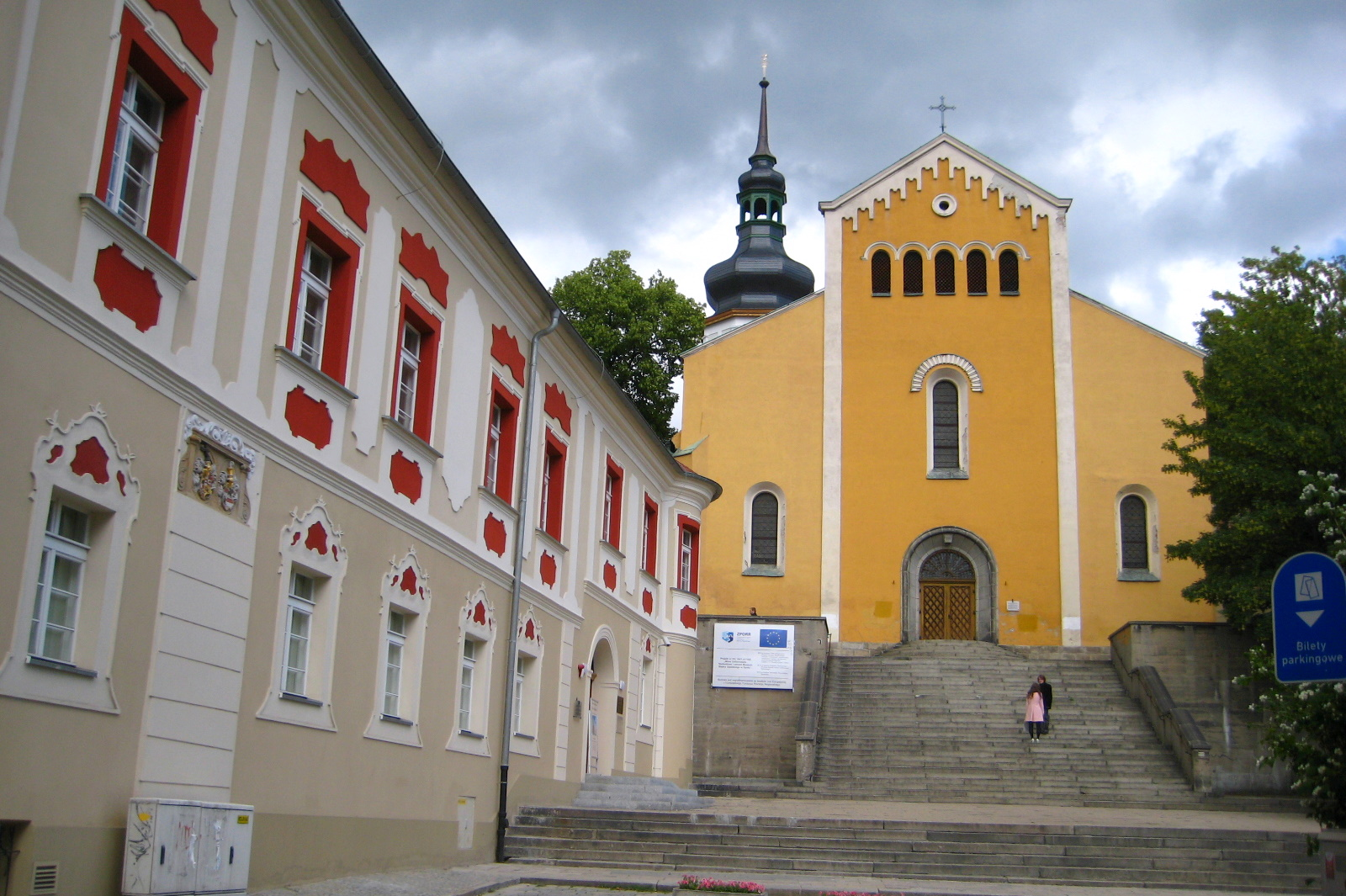 Blick auf die Bergelkirche in Oppeln, links ist das Hauptgebäude des Museums des Oppelner Schlesiens